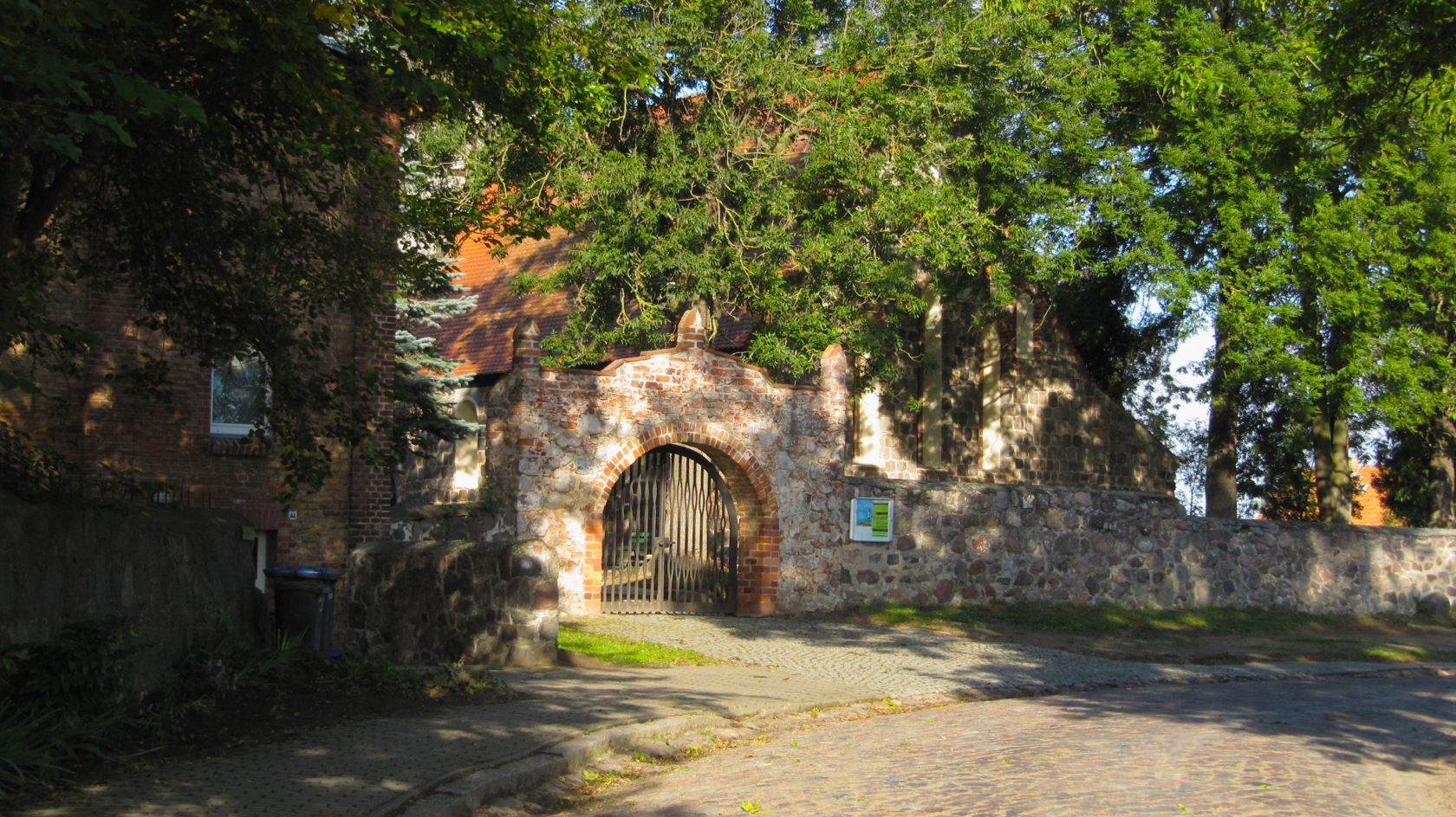 Ramin, Mecklenburg-Vorpommern, Kirchhofmauer